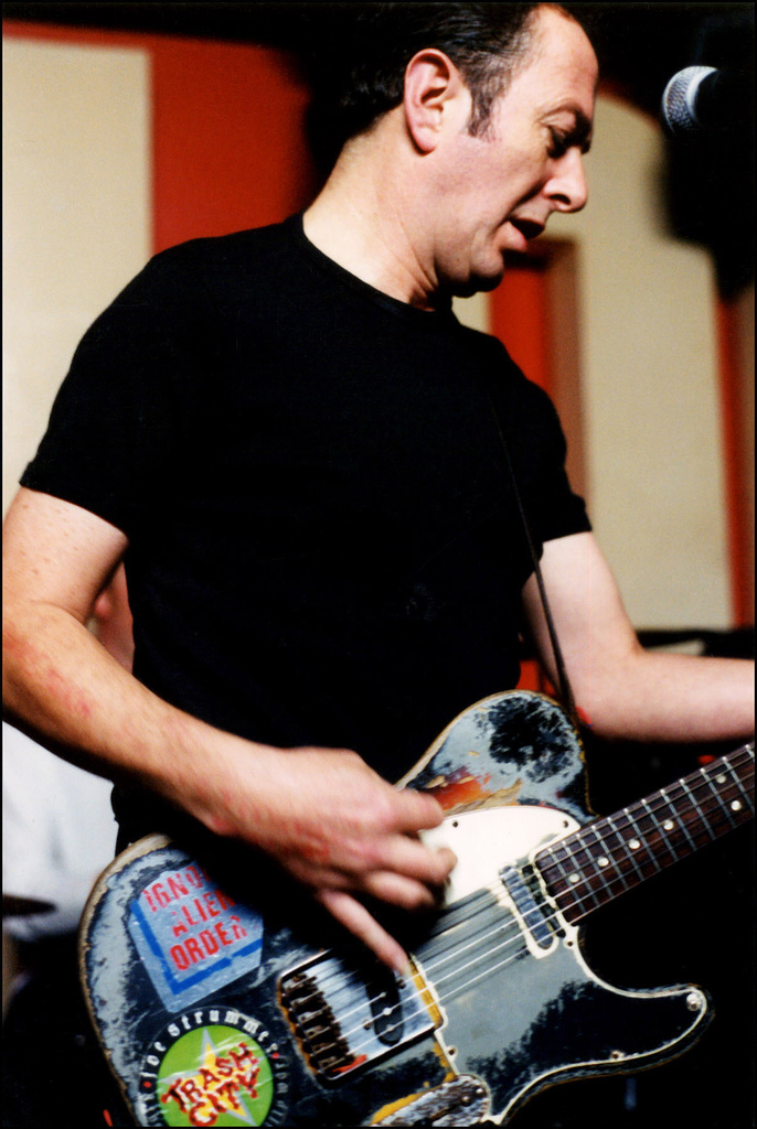 Joe Strummer December 19, 2001